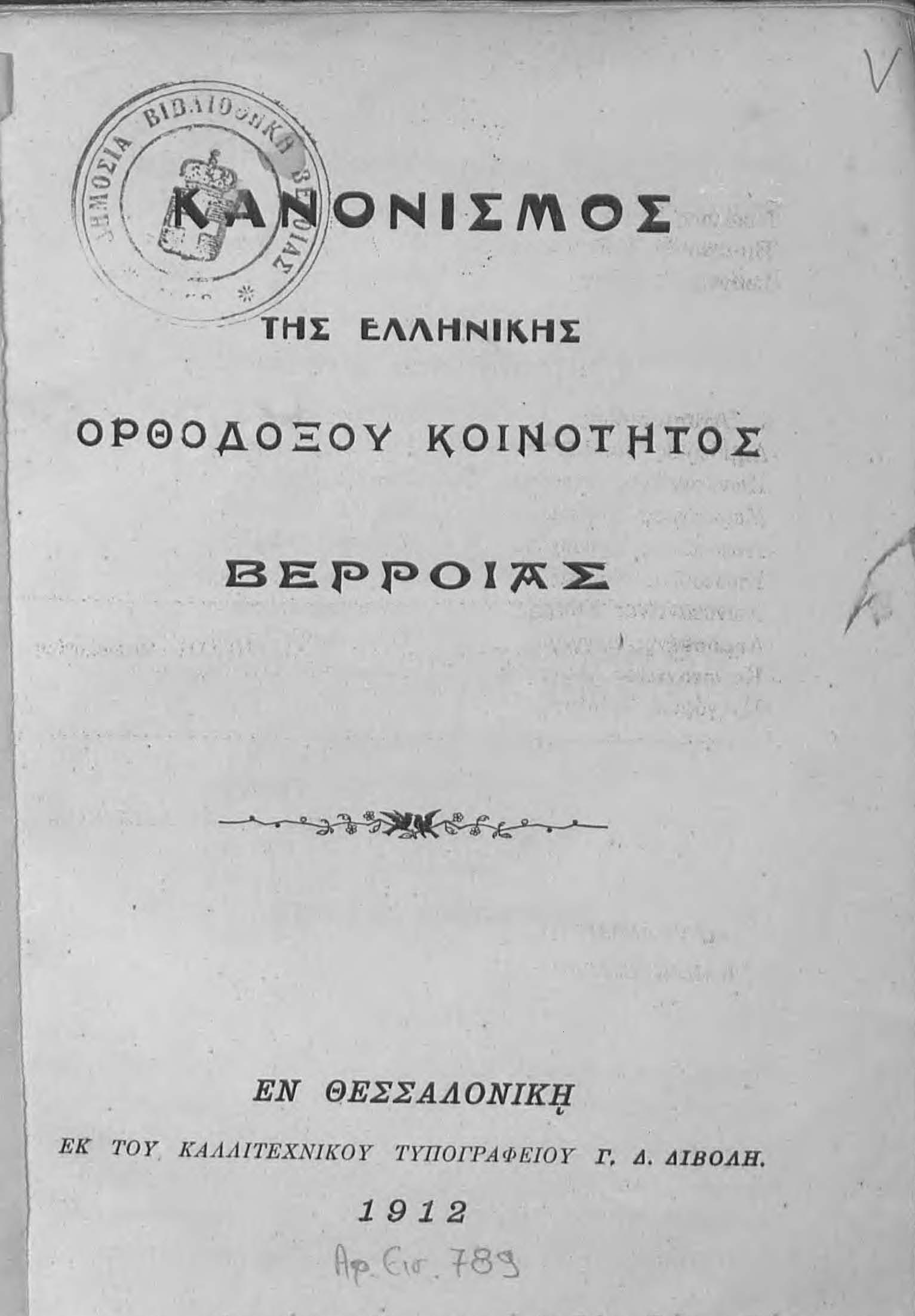 Статут на гръцката берска община